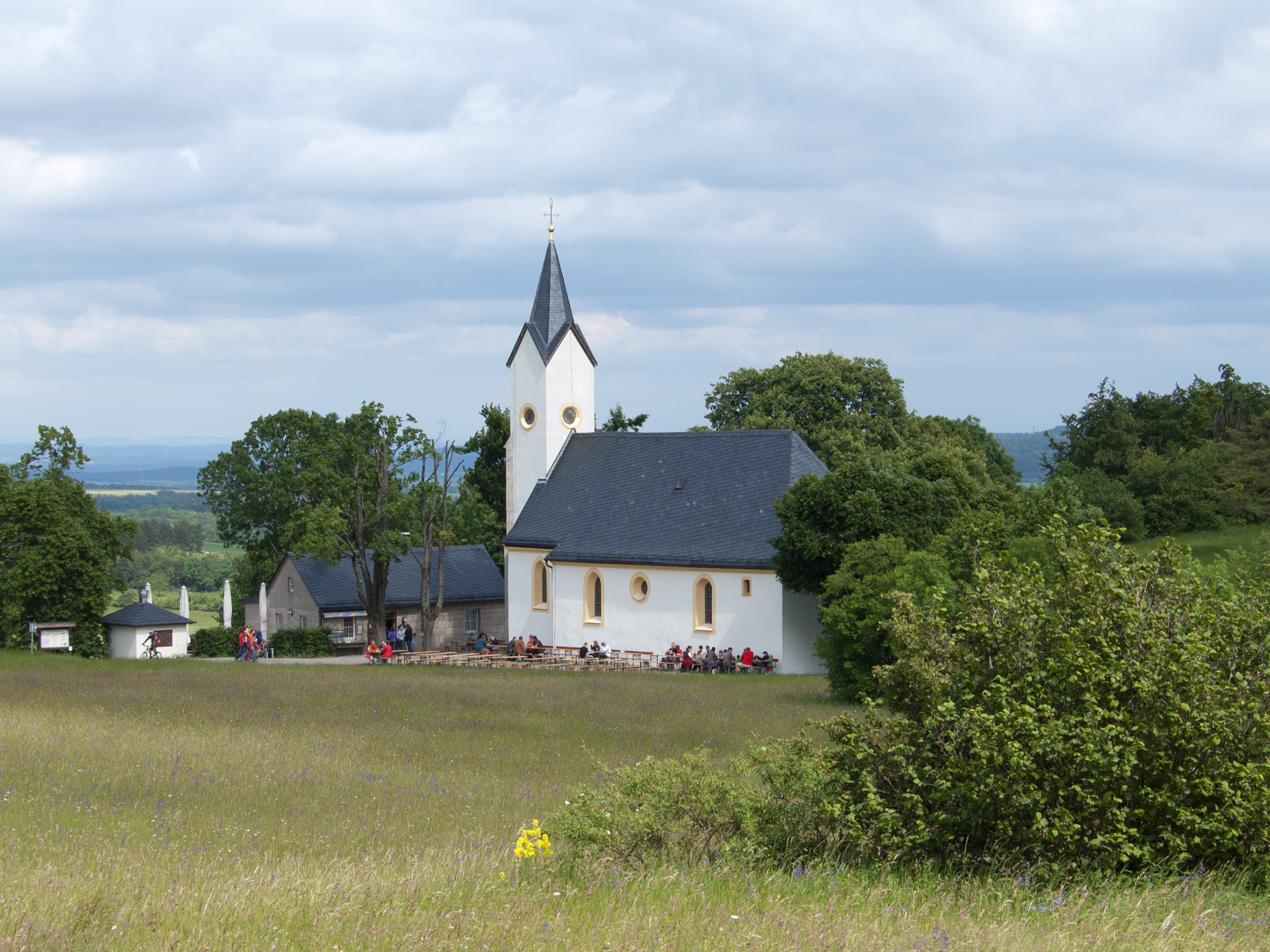 Adelgundiskapelle auf dem Staffelberg bei Bad Staffelstein